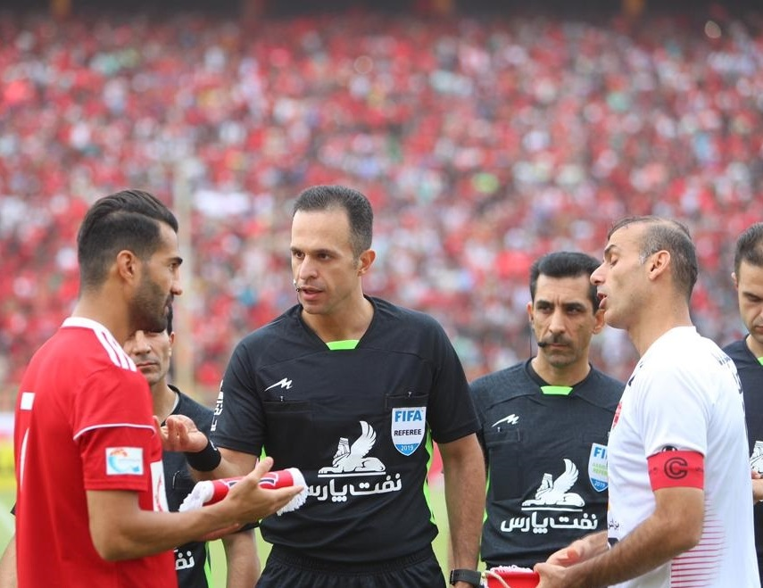 تراکتورسازی و پرسپولیس